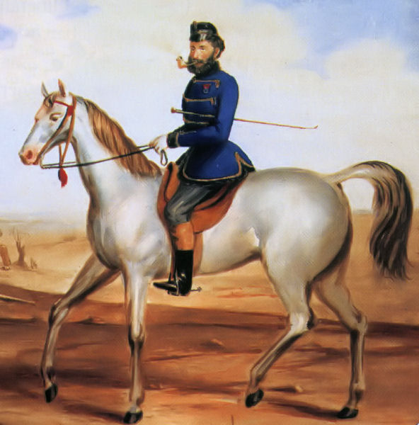 Mészáros Lázár honvéd altábornagy, az első felelős magyar kormány hadügyminisztere (vízfestmény)